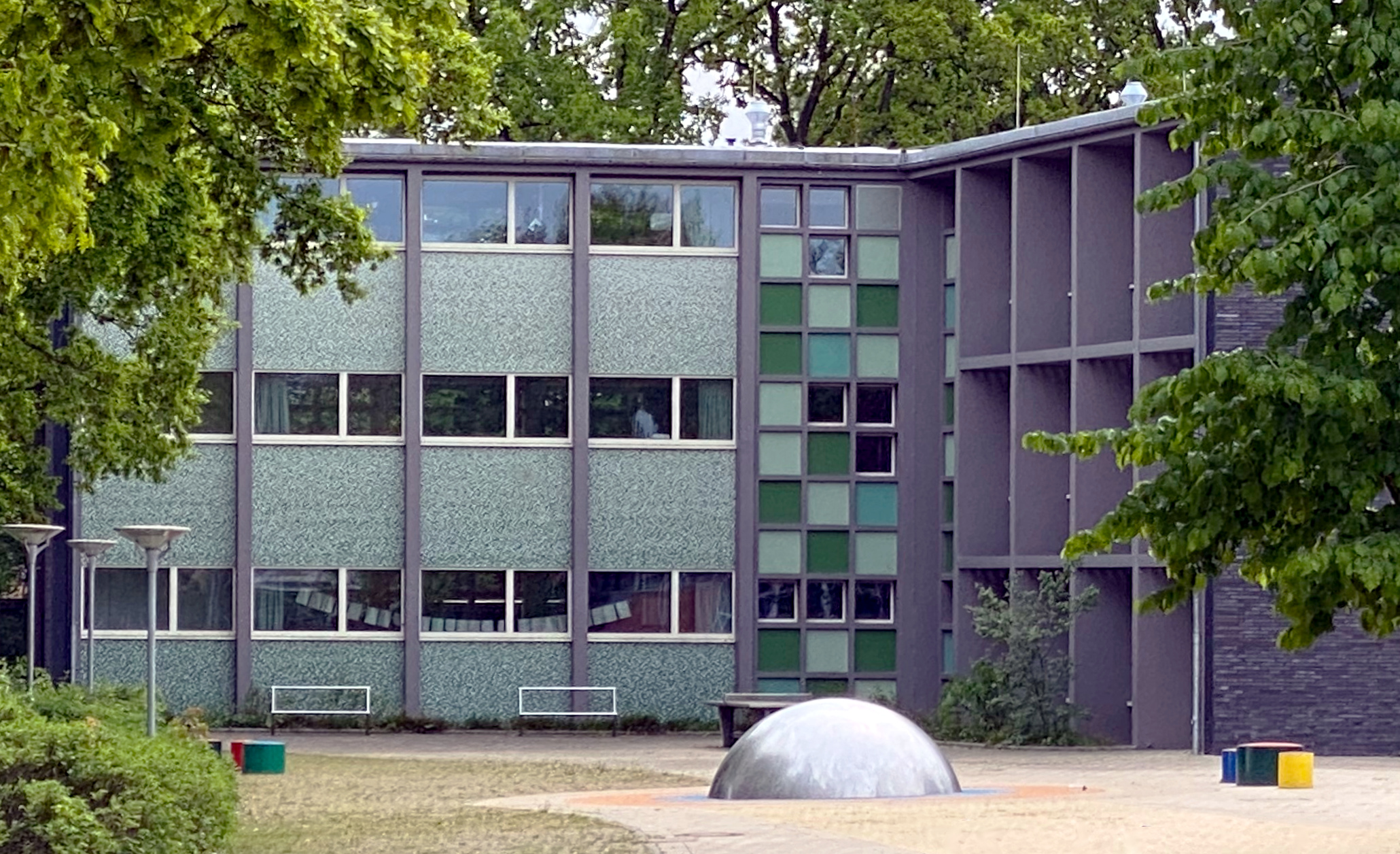 Kreuzbau am Schierenberg in Hamburg-Rahlstedt. Erbaut 1960 für die Schule Schierenberg, welche 2006 geschlossen wurde. Nach Leerstand und Vandalismus wurde der Kreuzbau von 2013 bis 2014 grundsaniert, und wird seitdem von der Beobachtungsstufe (Klasse 5–6) des Gymnasium Meiendorf genutzt.